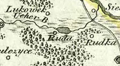 Ruda na mapie Galicji Wschodniej, 1803 r.